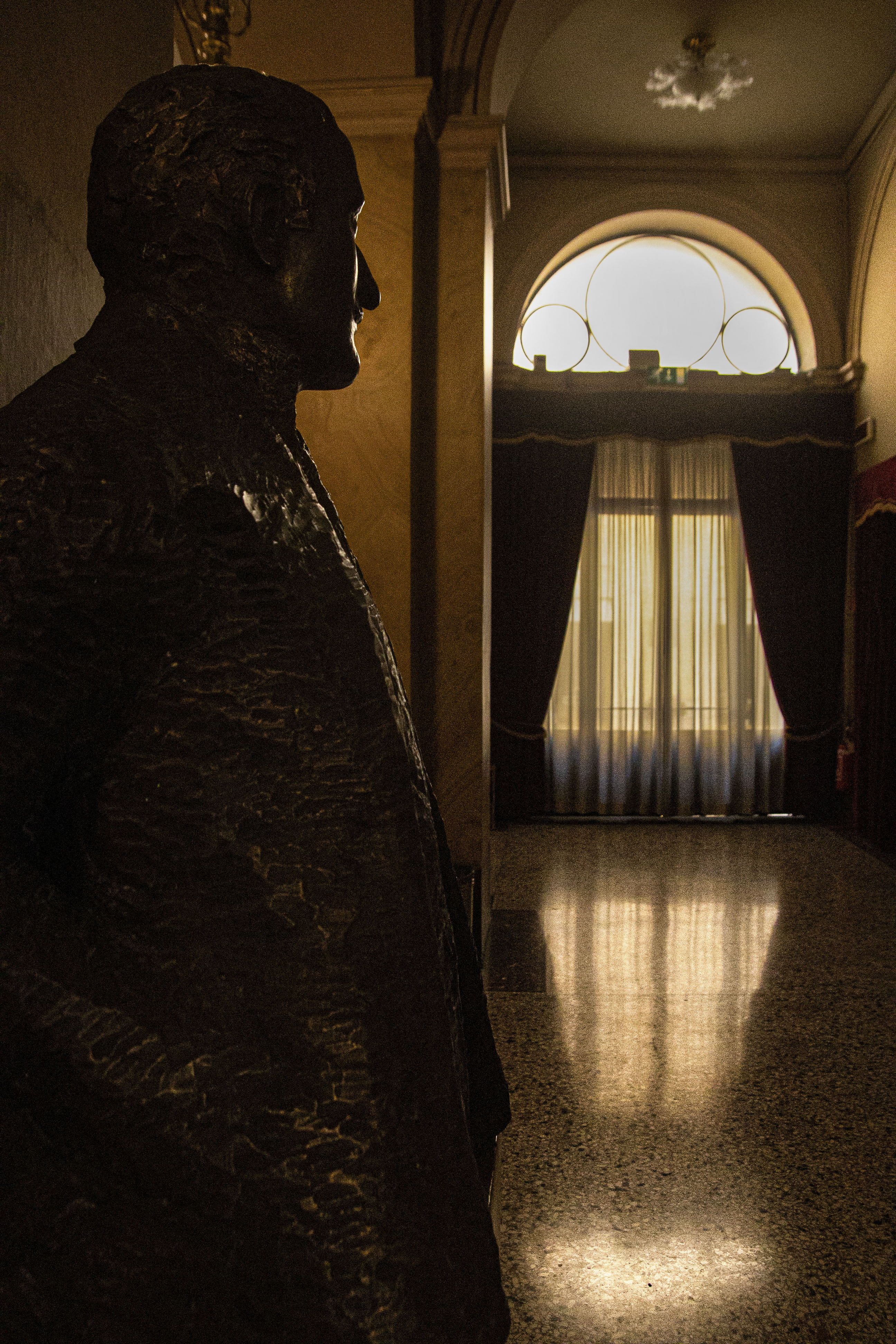 Teatro Flavio Vespasiano This is a photo of a monument which is part of cultural heritage of Italy. Questa è una foto di un bene culturale italiano che partecipa al concorso Wiki Loves Valle del Primo Presepe 2019, gestito in coperazione con Wikimedia Italia. This is a photo of a monument which is part of cultural heritage of Italy. This monument participates in the contest Wiki Loves Valle del Primo Presepe 2019, operated in cooperation with Wikimedia Italia.